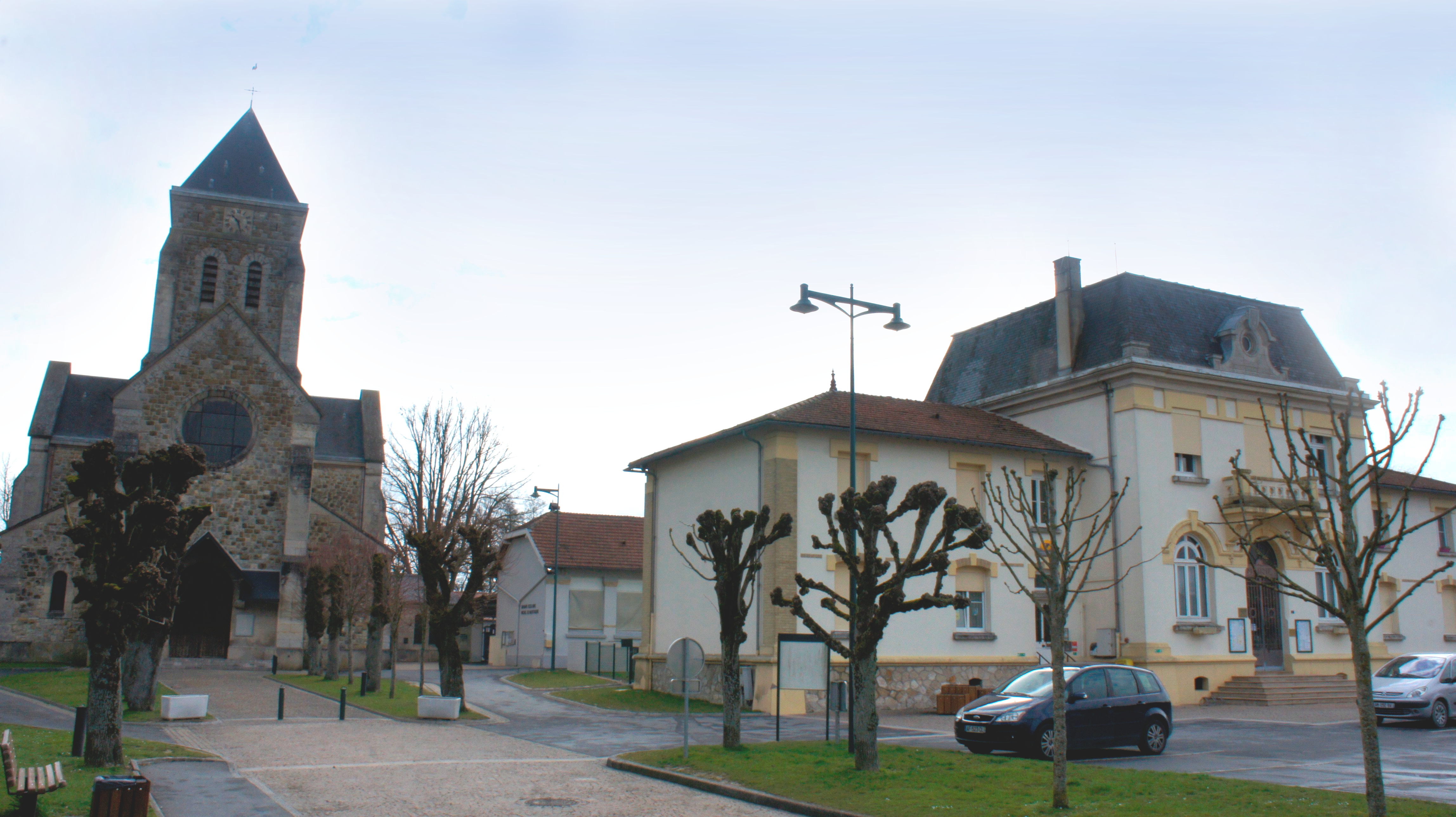 Mairie et église à Bétheniville .